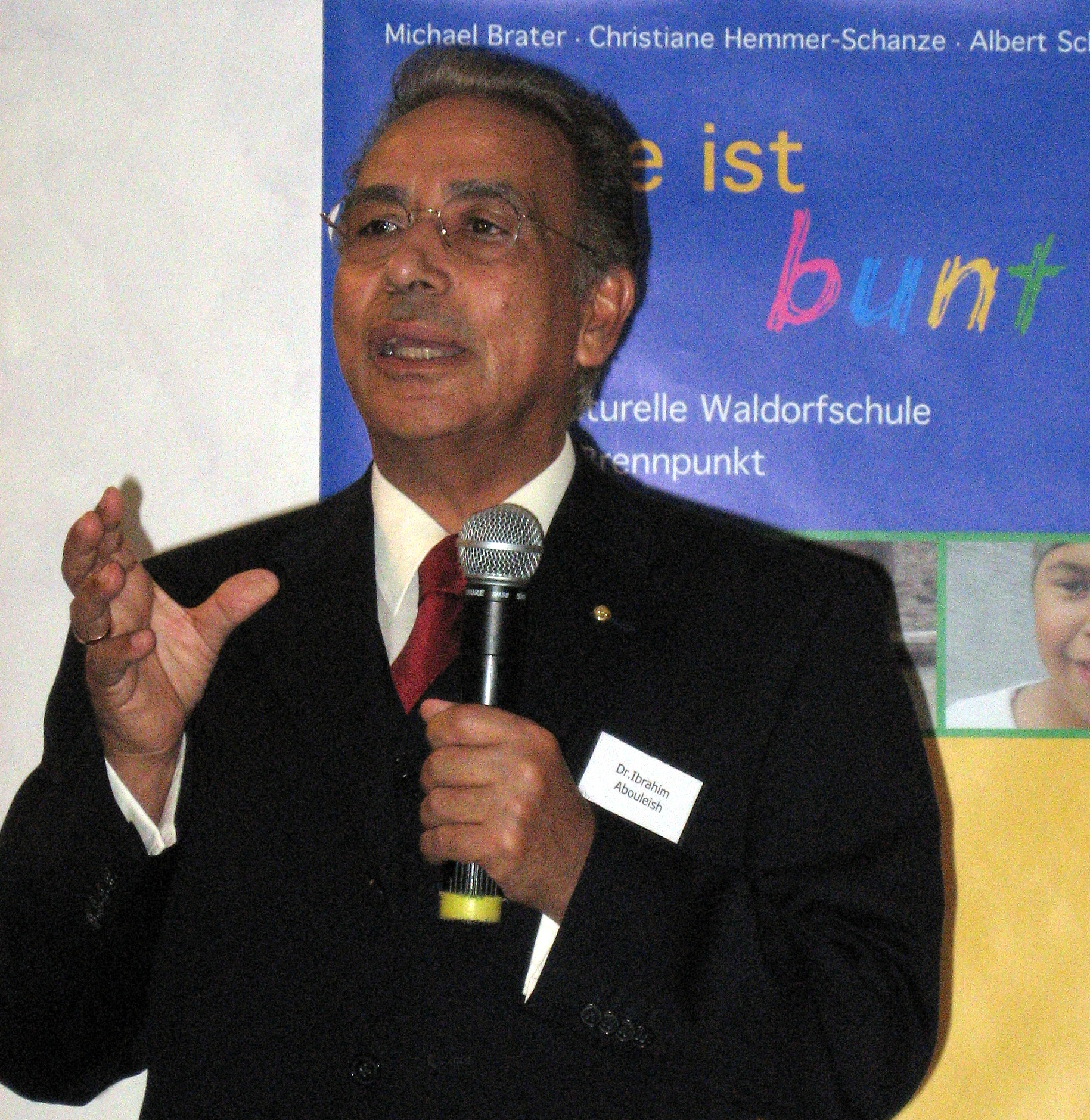 Ibrahim Abouleish am 20.11.2007 in der Freien Interkulturellen Waldorfschule Mannheim-Neckarstadt